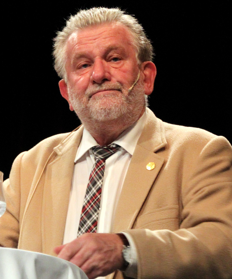 FN-dagen i Trondheim - Hans-Wilhelm Steinfeld møtte 470 publikummere i Storsalen i Studentersamfunnet på FN-dagen. Han var invitert av FN-sambandet for å sakke om Russlands rolle i internasjonal politikk. Foto: FN-sambandet / Sindre Hembre Kruse.